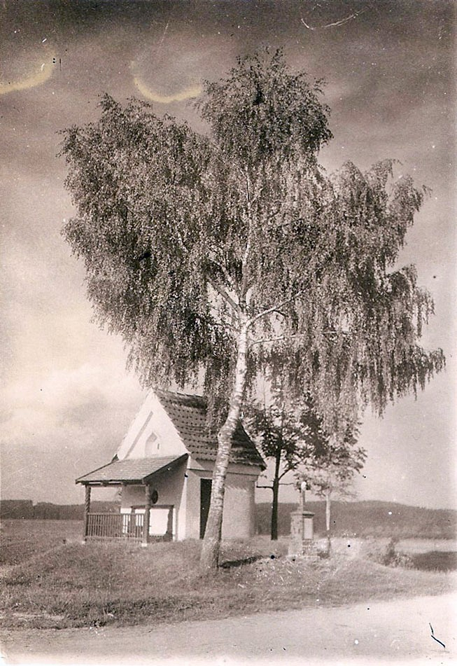 Die Ottilienkapelle an der Donaustraße